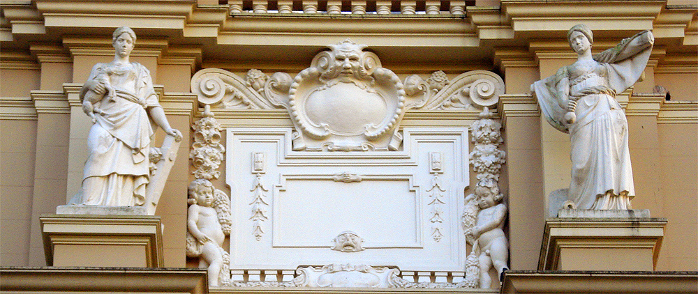 Detalhe da fachada do MARGS, Porto Alegre, Brasil. Esculturas de Alfred Adloff